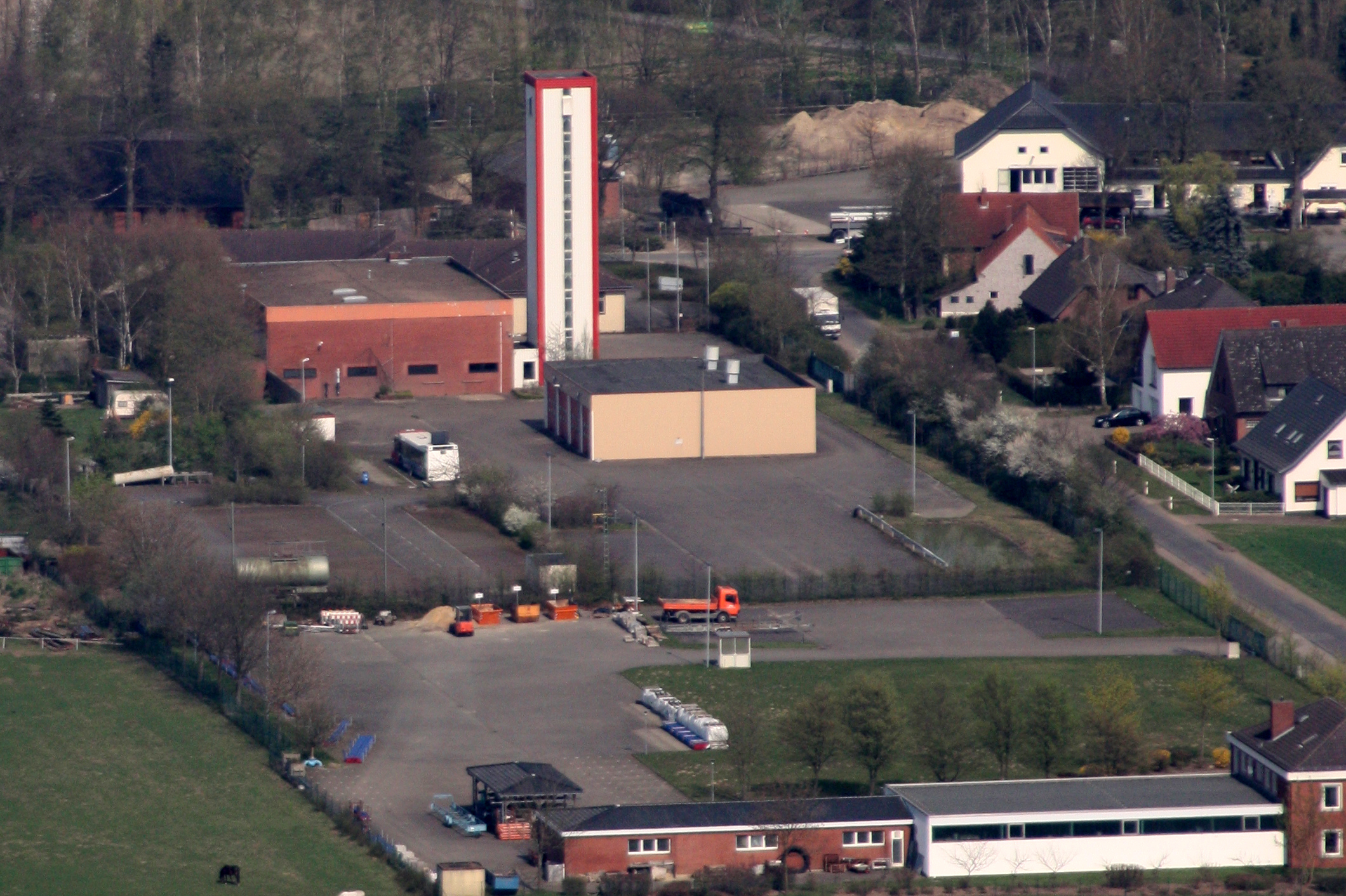 Gessel, Syke, Landkreis Diepholz, Niedersachsen